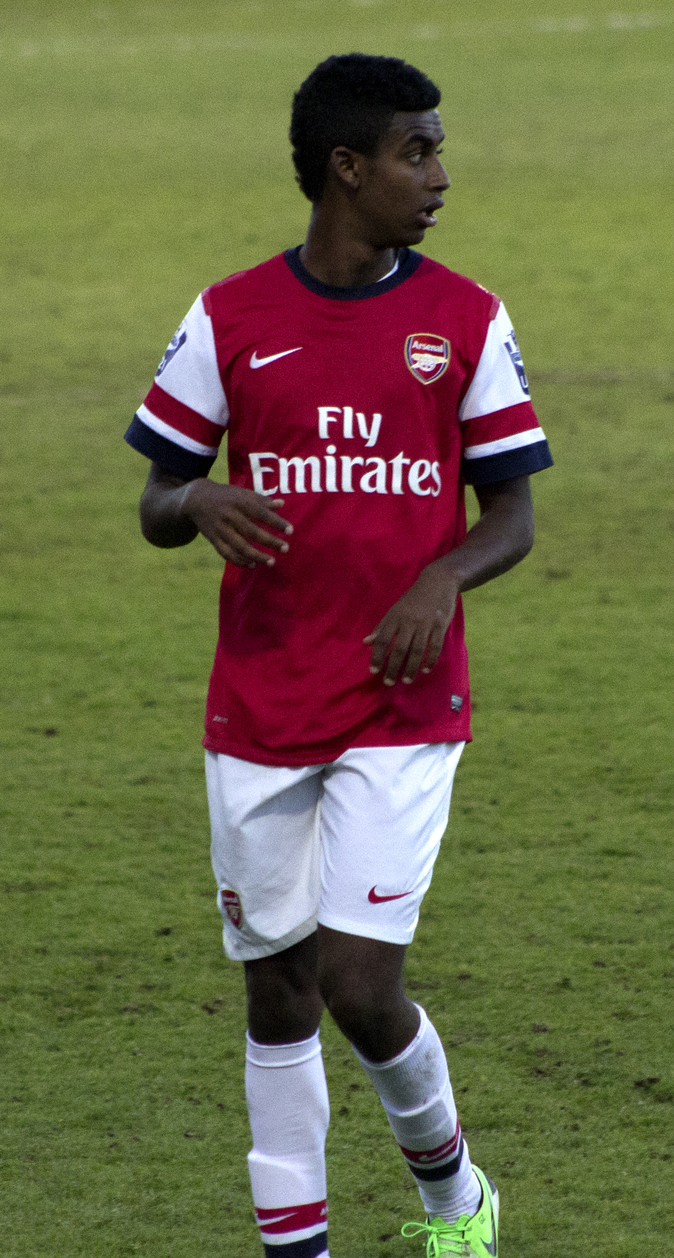 Zelalem faisant ses débuts contre les moins de 21 ans de Liverpool